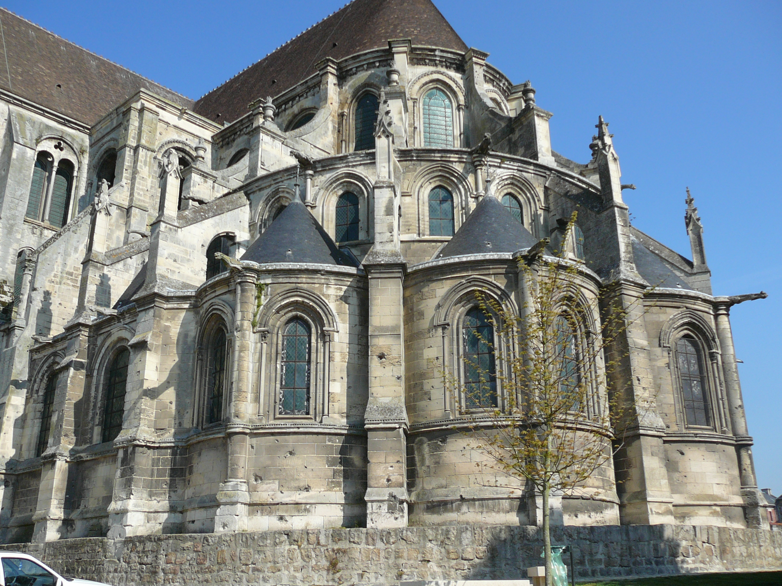 Le chevet de la cathédrale de Noyon Auteur : So Leblanc, 2007